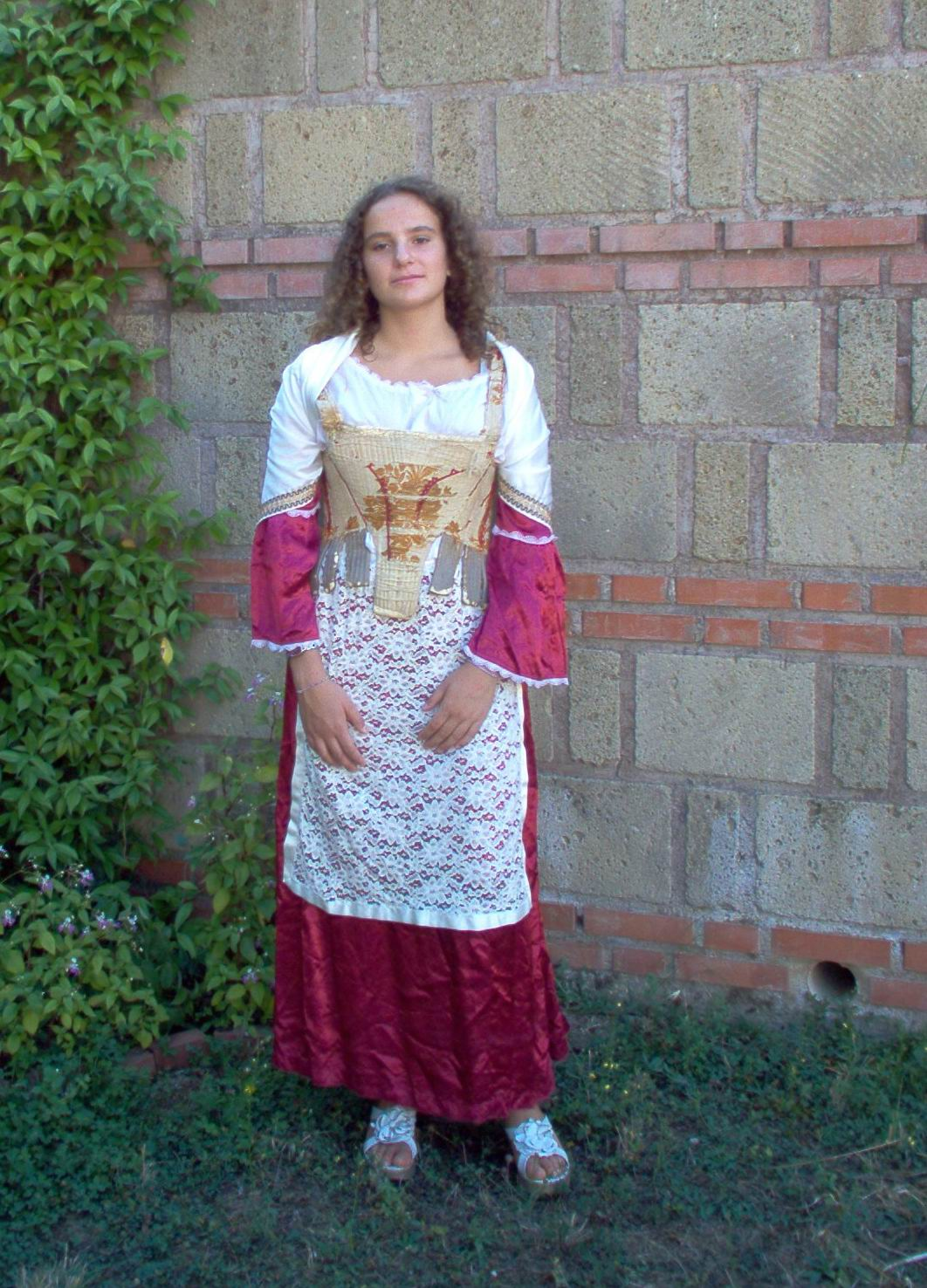 Costume tradizionale Morlupo (Roma)